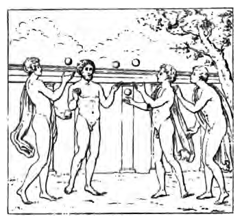 ¿Juego del trigon? (Denkmäler des klassischen Altertums zur Erläuterung des Lebens der Griechen und Römer in Religion, Kunst und Sitte, Bde 1., München/Leipzig 1885, p. 249, fig. 230)